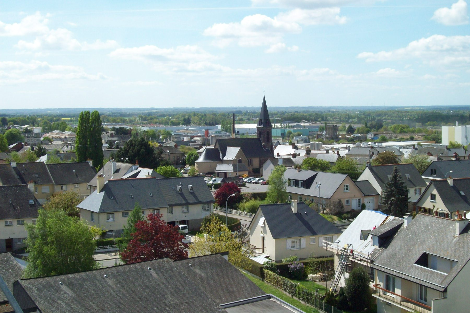 Le centre-ville de L'Hermitage, vu du haut de son château d'eau, avec l'église Notre-Dame-de-la-Purification.